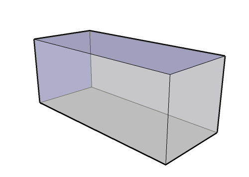 Vue semi-transparente d'un parallélépipède rectangle